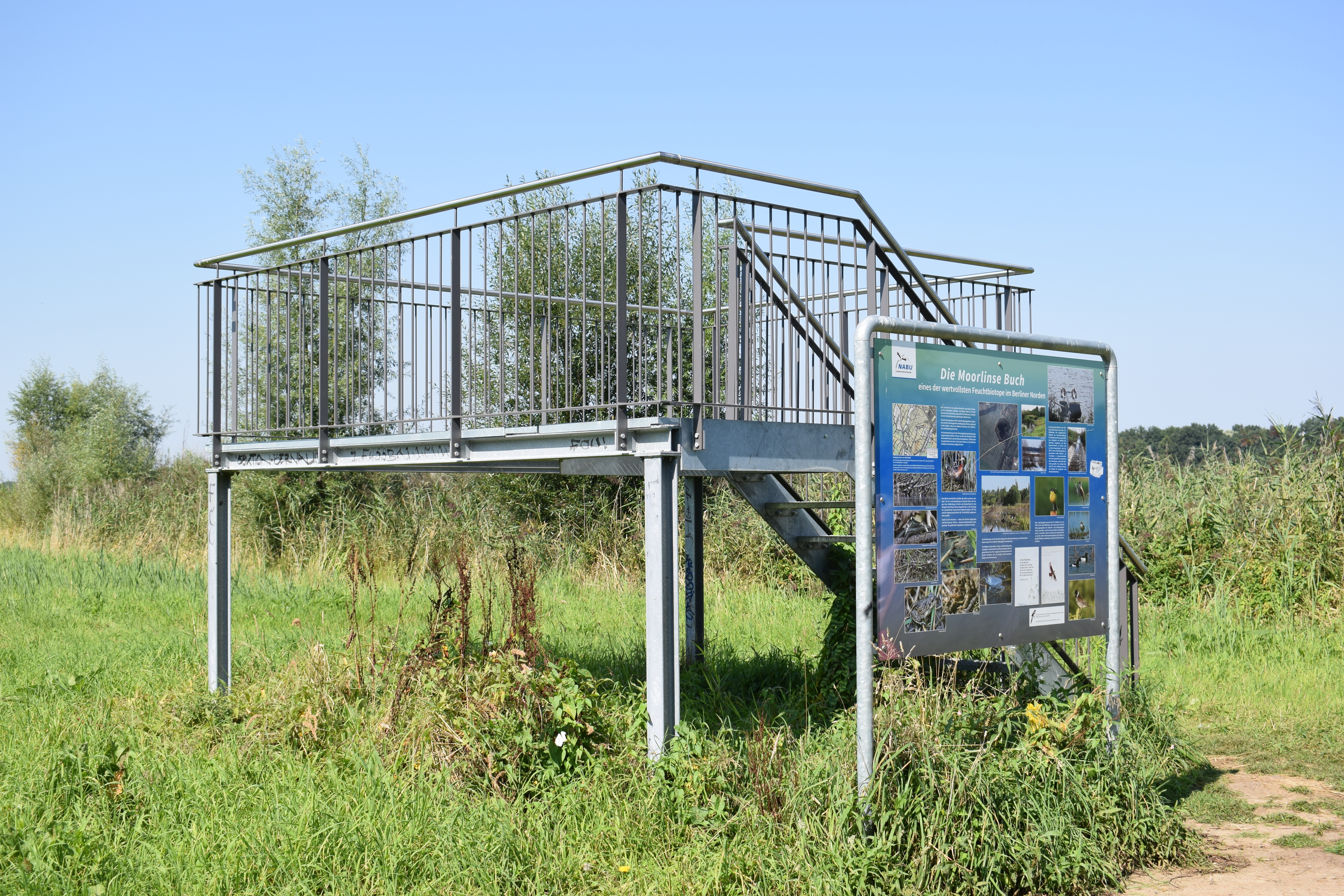 Aussichtsplattform und Informationstafel an der Moorlinse Buch, Berlin.